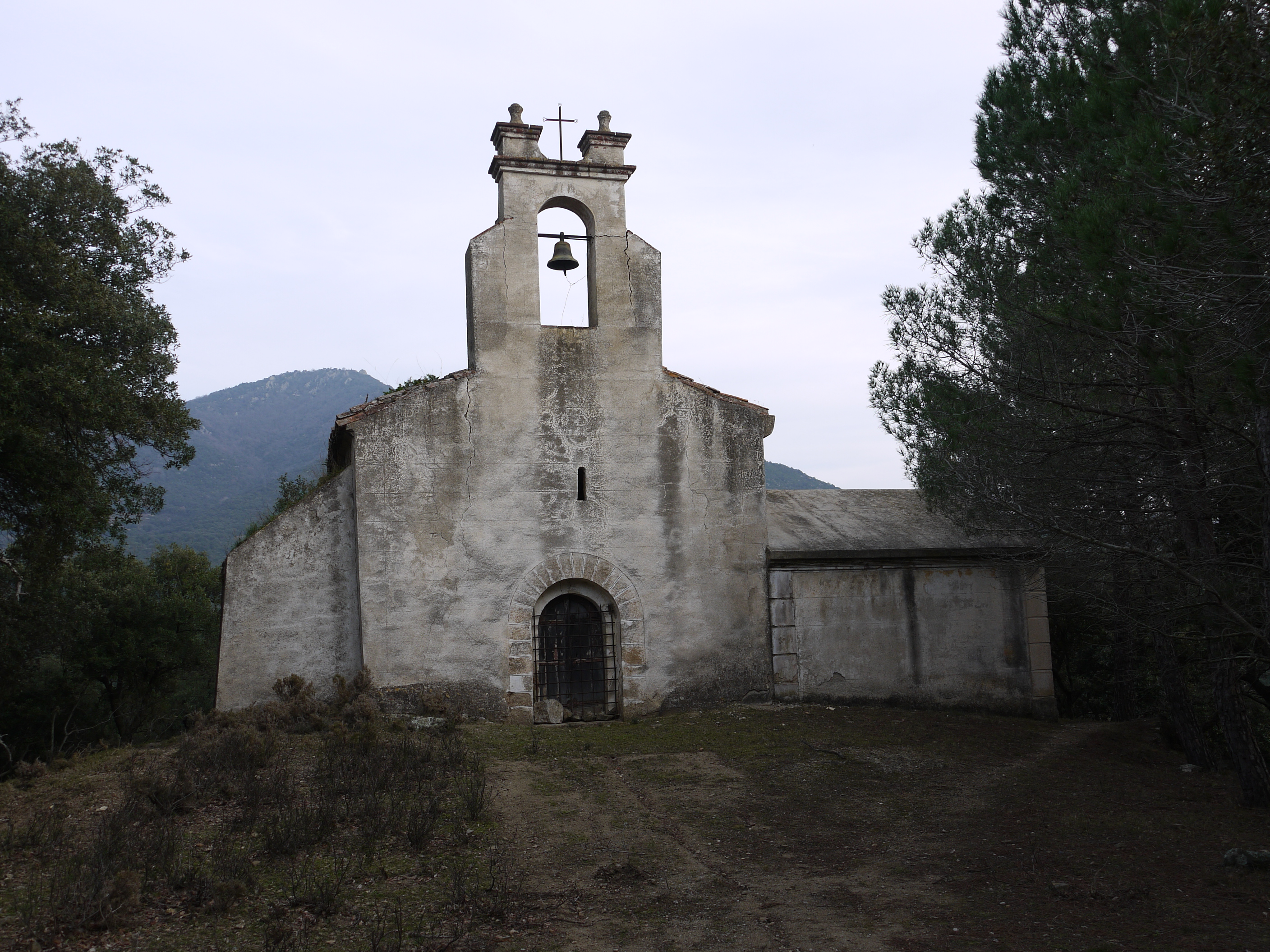 Face ouest de l'église Saint-Pierre de Laner